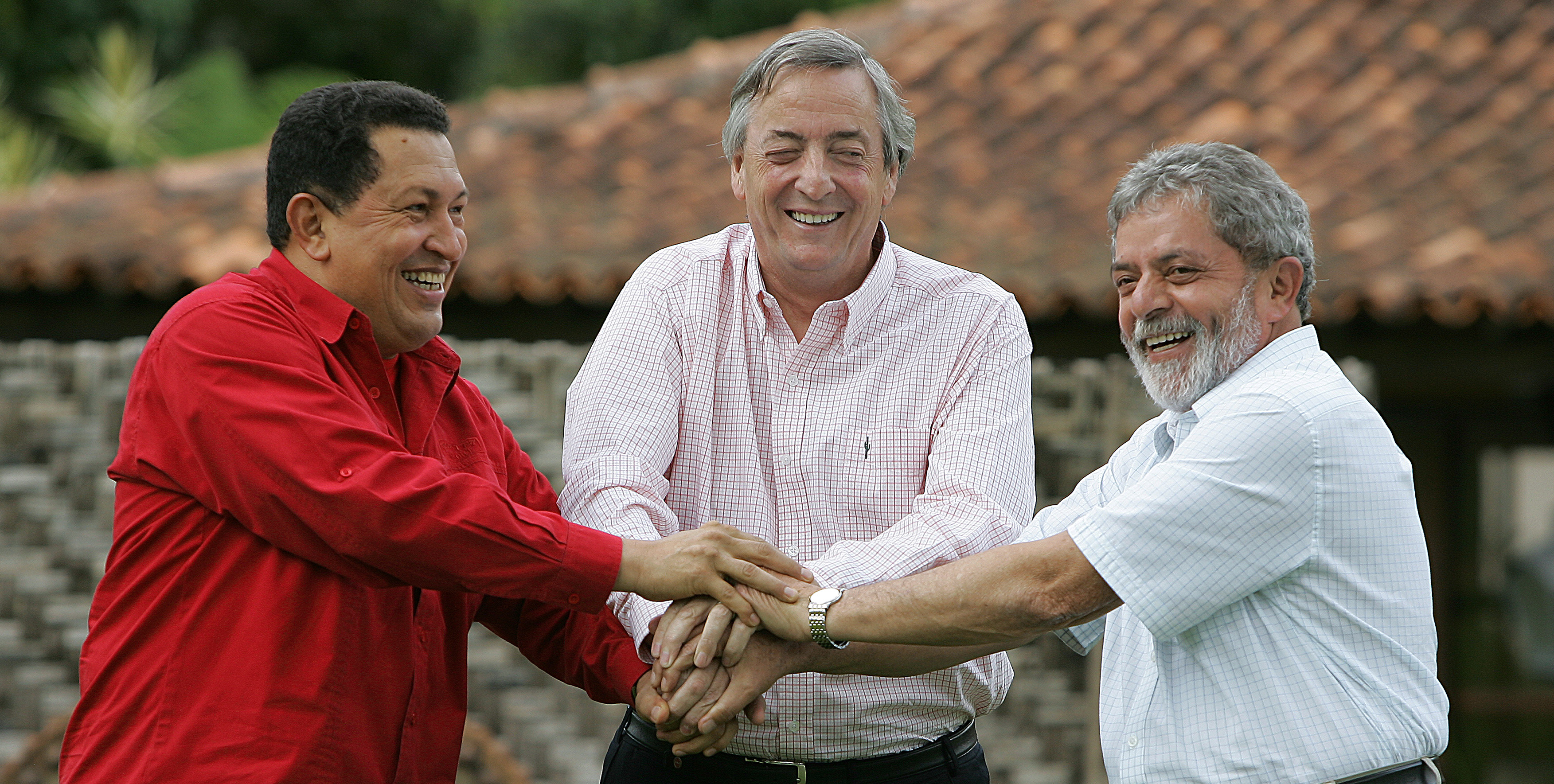 Brasília - Presidente Lula e os presidentes Hugo Chavez e Néstor Kirchner durante reunião na Granja do Torto